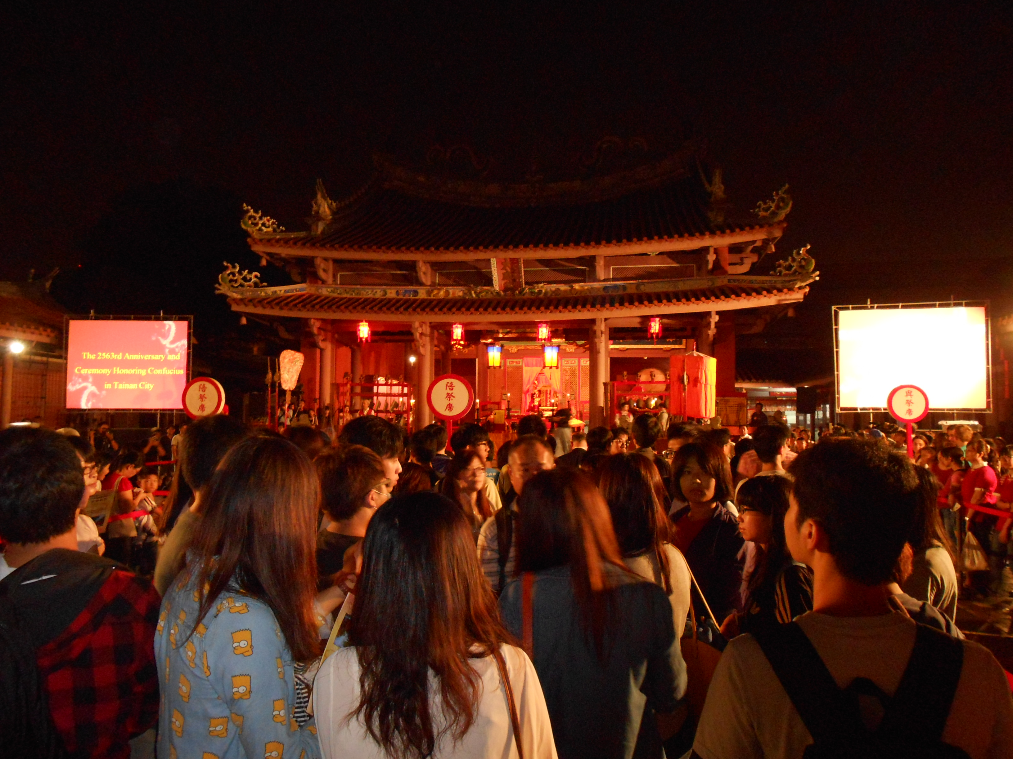 中文（台灣）: 台南孔子廟祭孔大典。